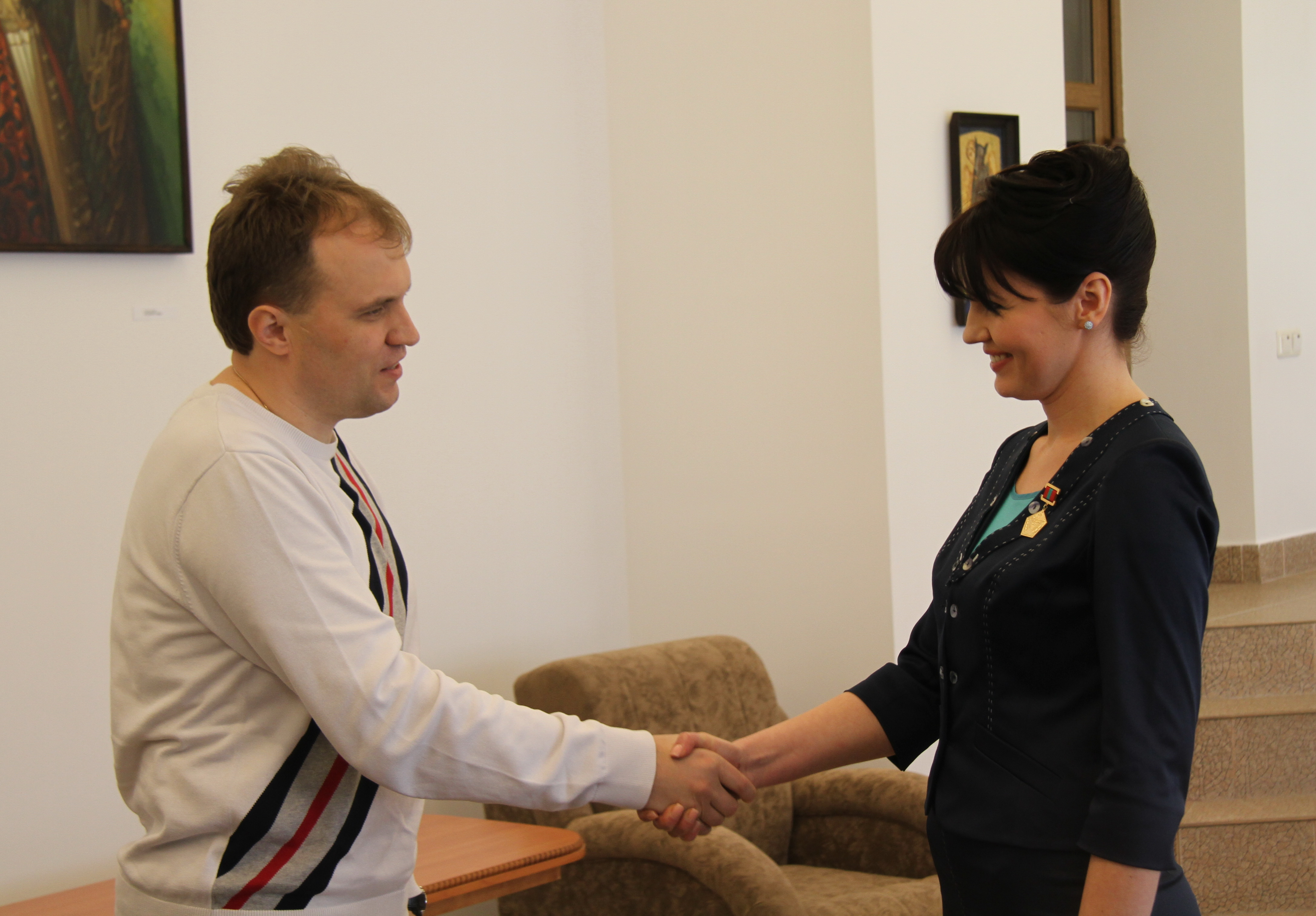 Президент ПМР Евгений Шевчук вручает нагрудный знак «Заслуженный сотрудник дипломатической службы Приднестровской Молдавской Республики» Нине Штански (2012 год)